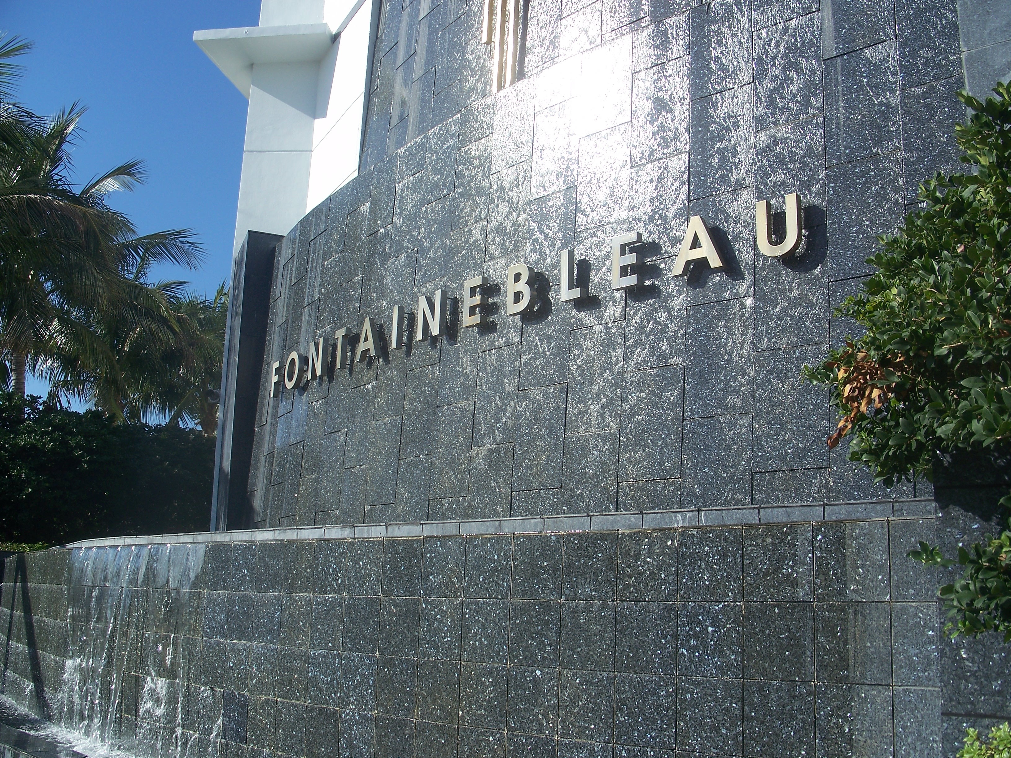 Miami Beach, Florida: Fontainebleau Hotel